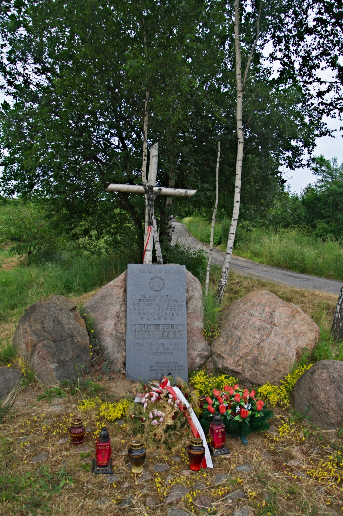 Krzyż i tablica w miejscu śmierci Feliksa Pendelskiego (postać do października 2009)